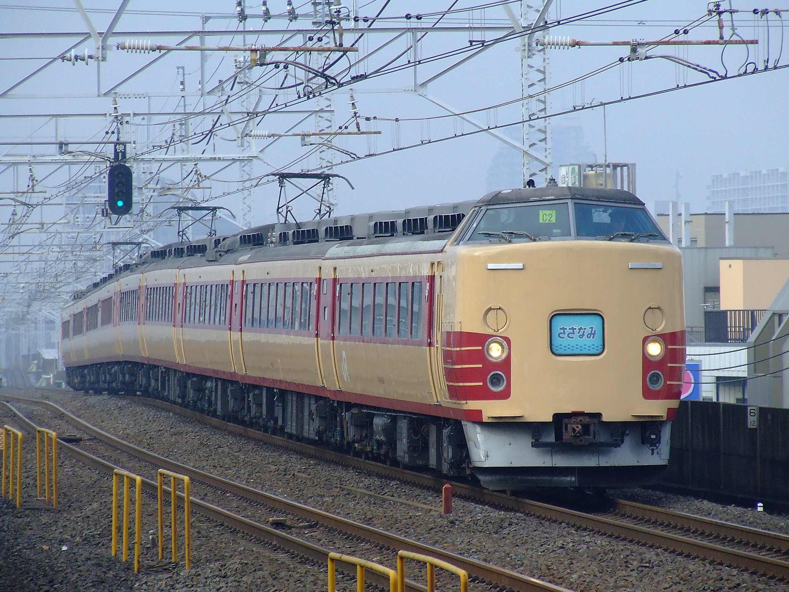 JR東日本183系（幕張C2編成）特急「さざなみ」 小岩にて